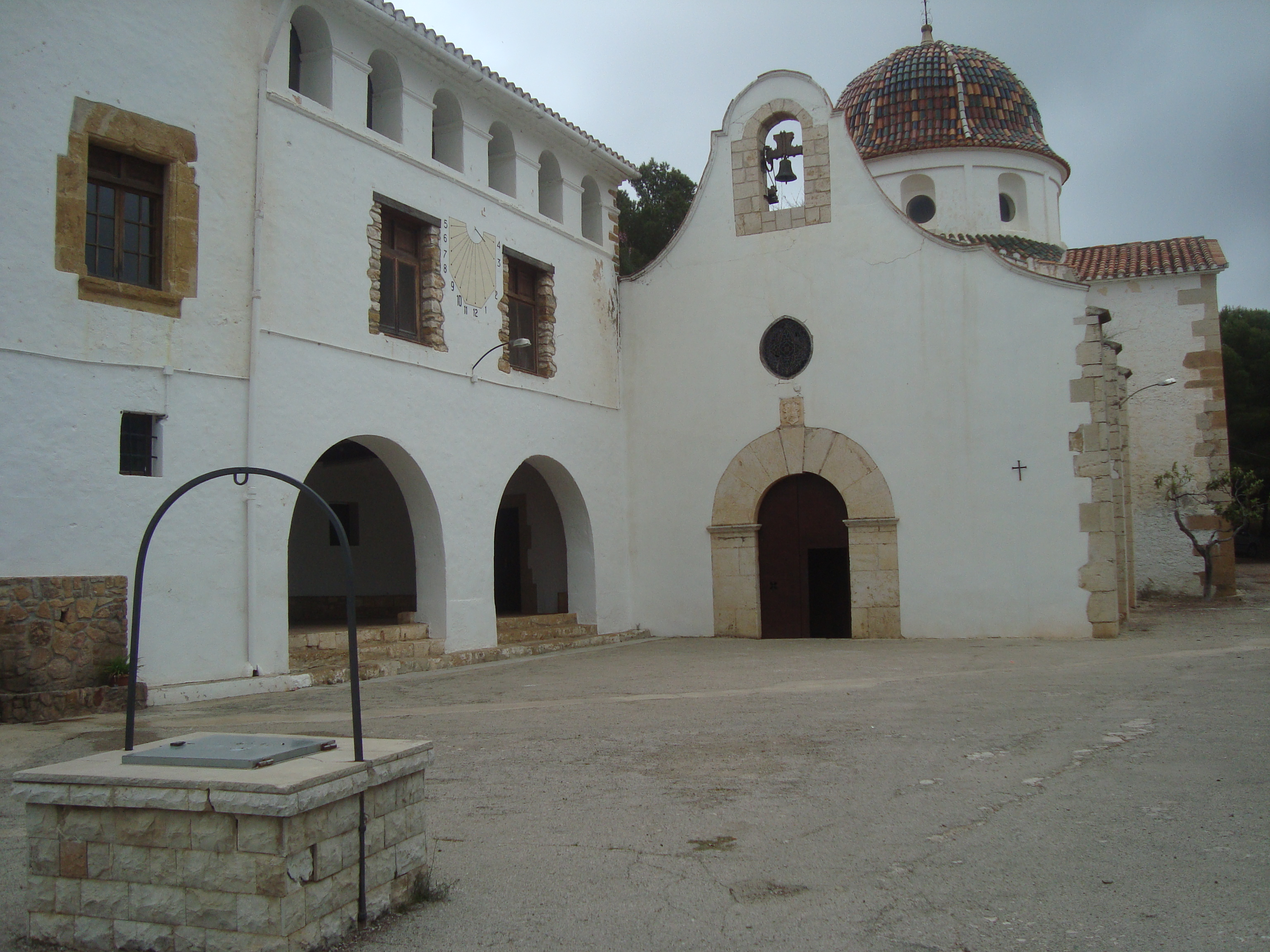 Ermita de la Mare de Déu del Remei (Alcanar)